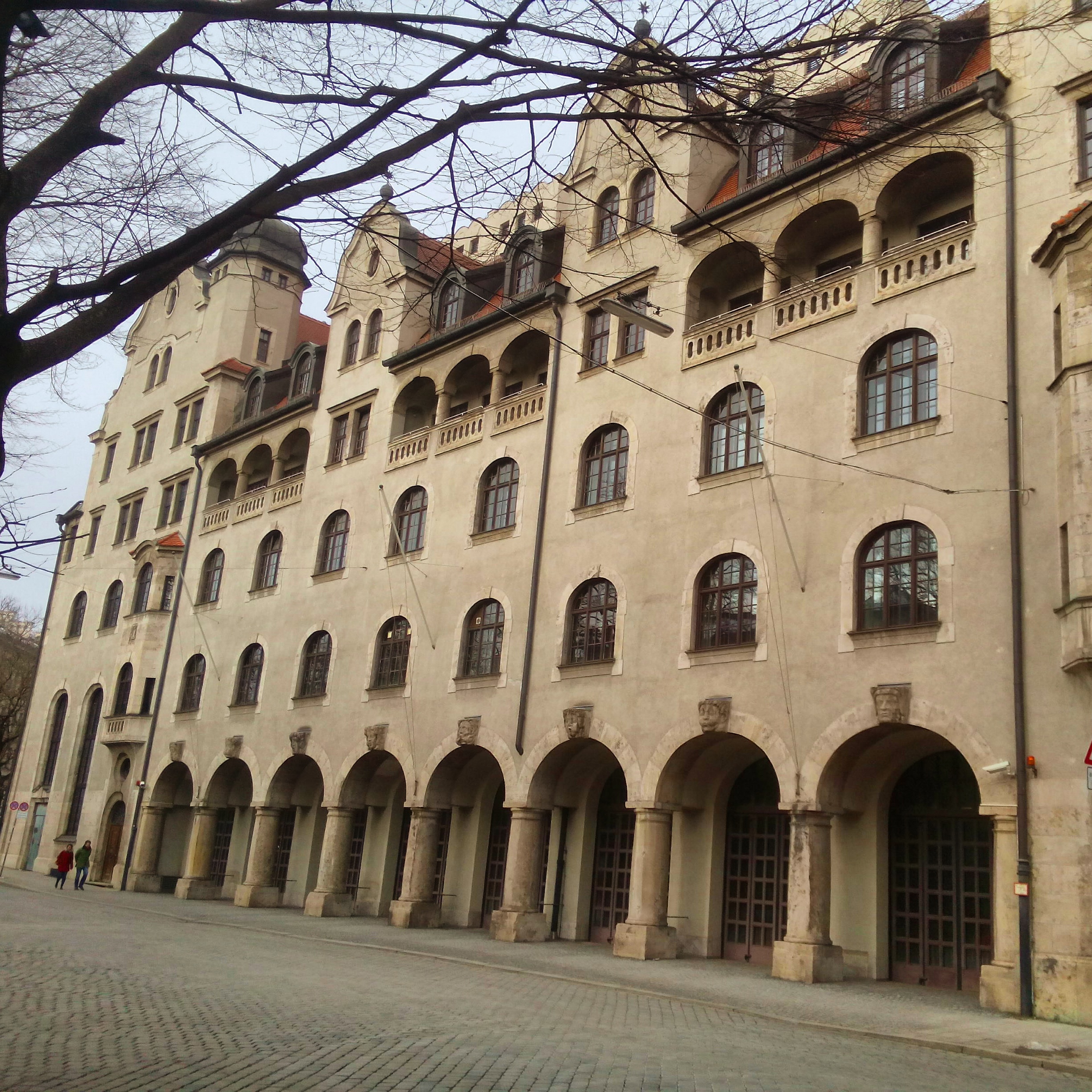 Ansicht Hauptfeuerwache MünchenThis is a photograph of an architectural monument.